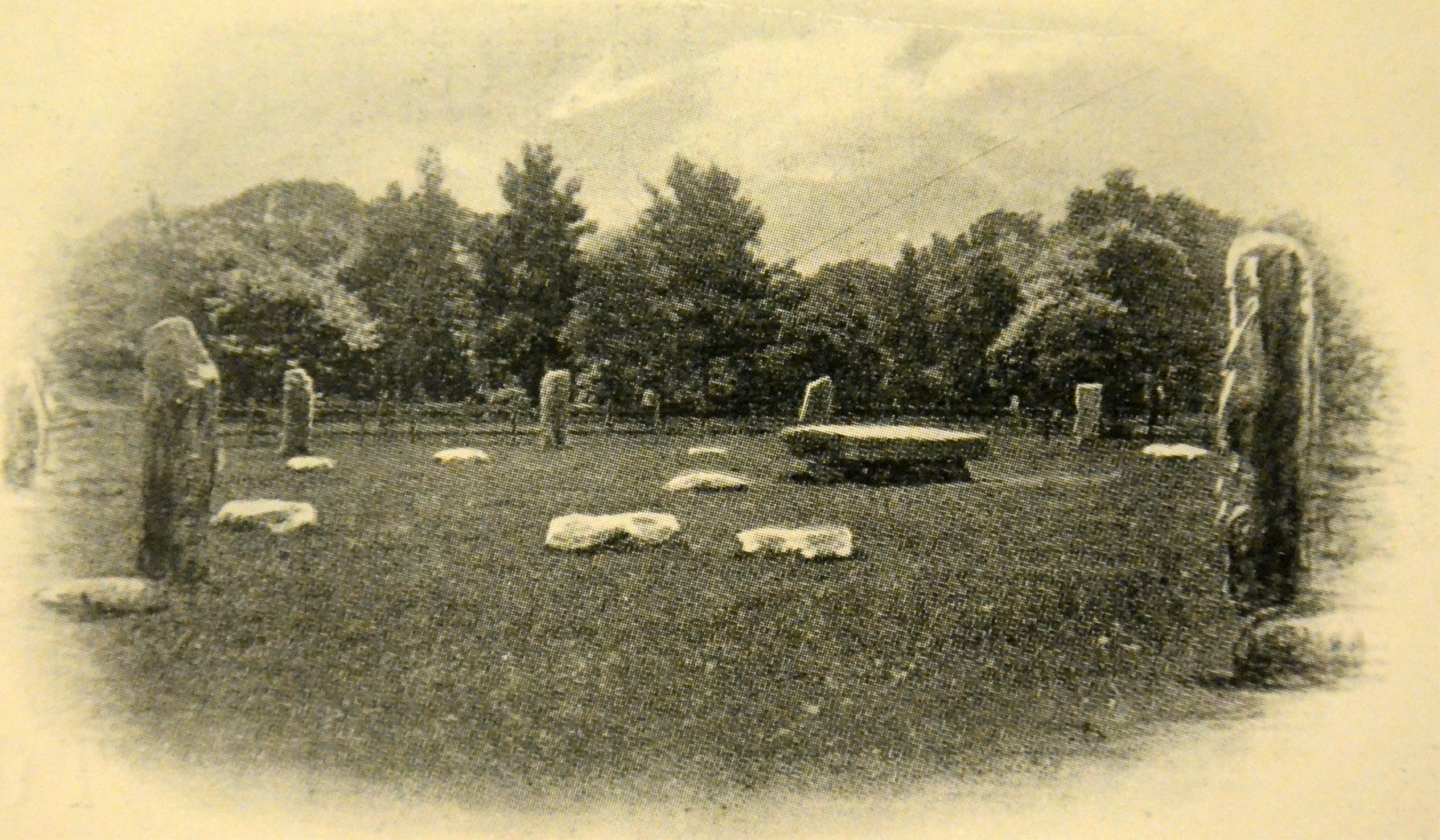 Champ aux menhirs (lieu de réunion) du Gorsedd des bardes de l'île de Bretagne, vers 1900, à Cardiff ; photo ancienne extraite d'un article de la "Revue illustrée" intitulé "Fêtes celtiques au Pays de Galles"(Tome relié 1902)